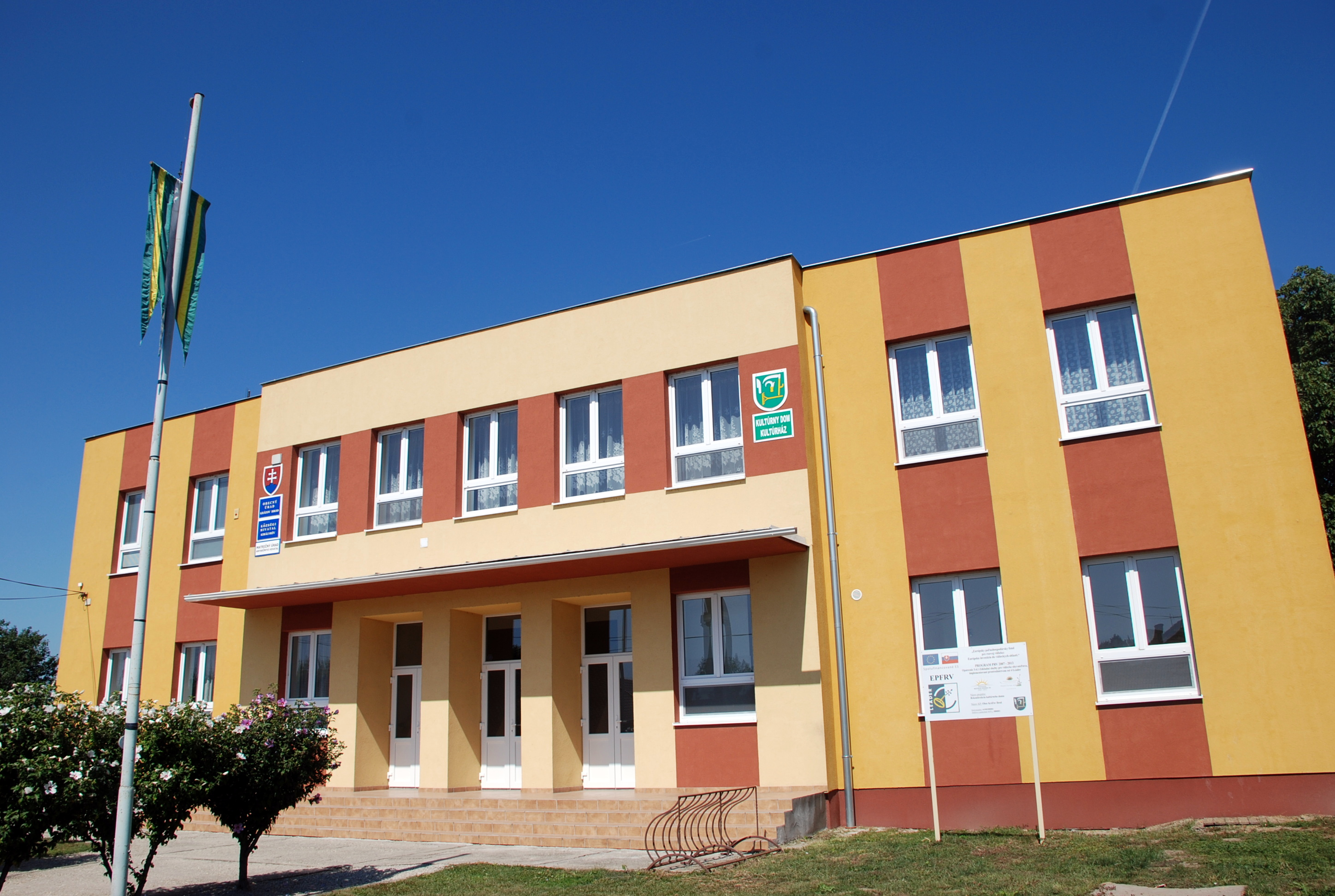 Kráľov Brod - obecný úrad